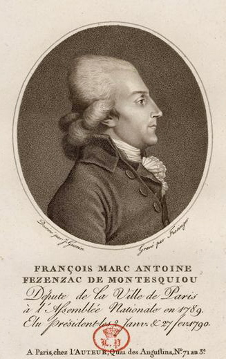 François Xavier Marc Antoine de Montesquiou-Fezensac (1756-1832)